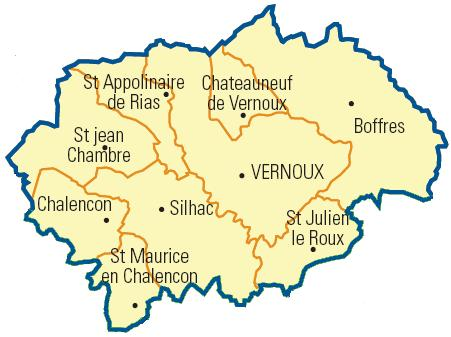 Carte détaillée des communes du canton (Ardèche)